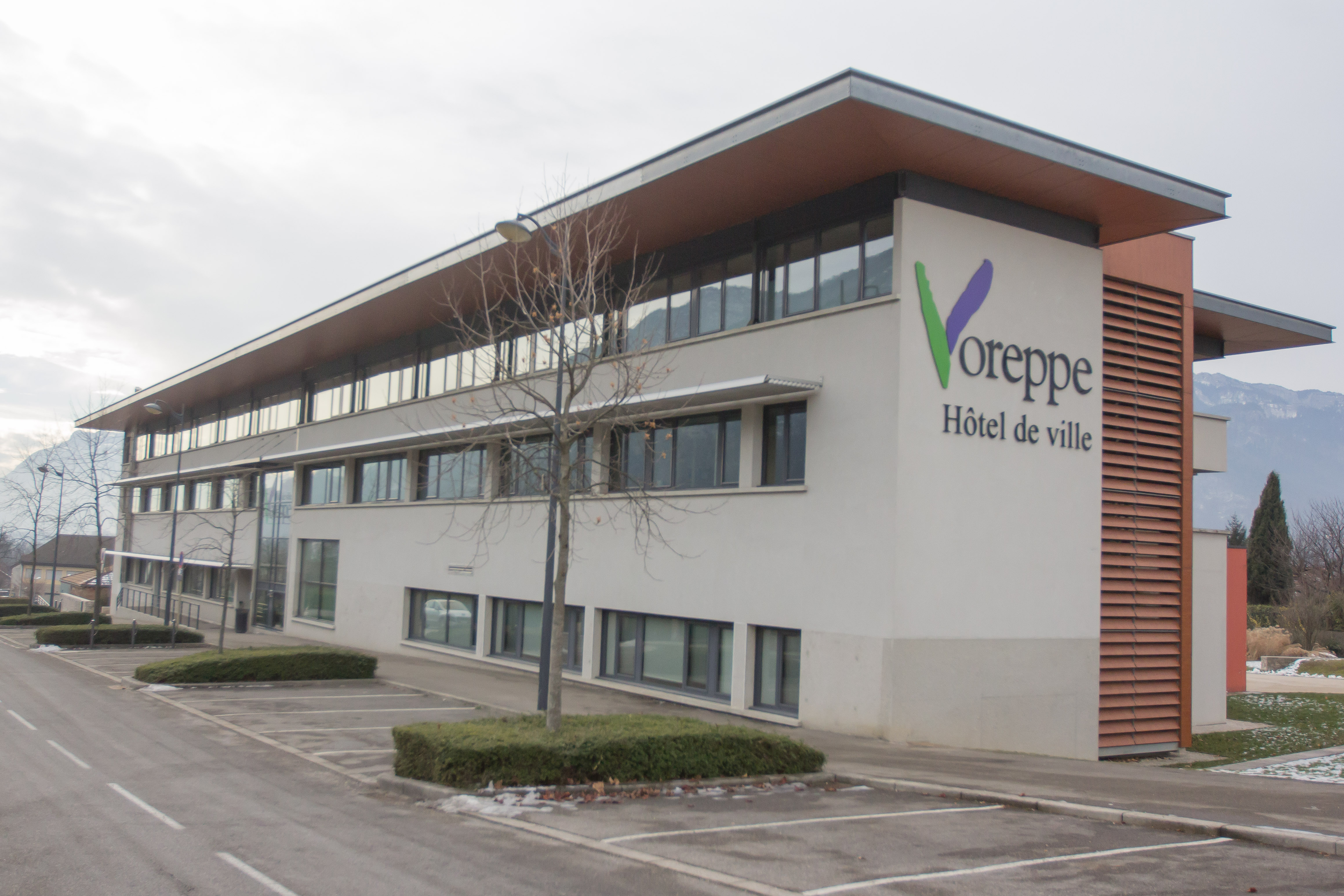 L'hôtel de ville de Voreppe (Voreppe, Isère, France)